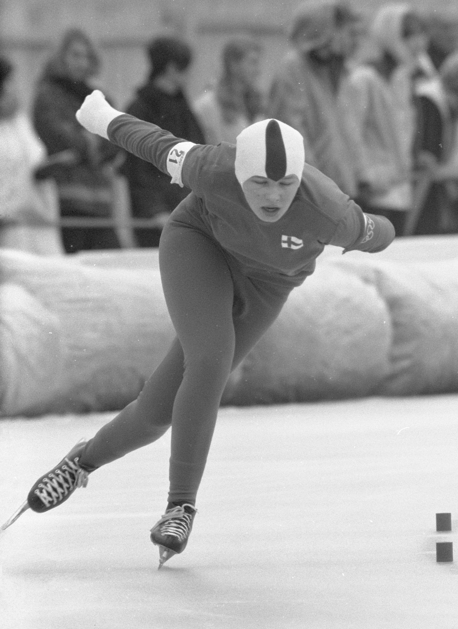 Olympische Winterspelen te Grenoble. Kaija-Liisa Keskivitikka (Finland) in actie op de 3000 meter.